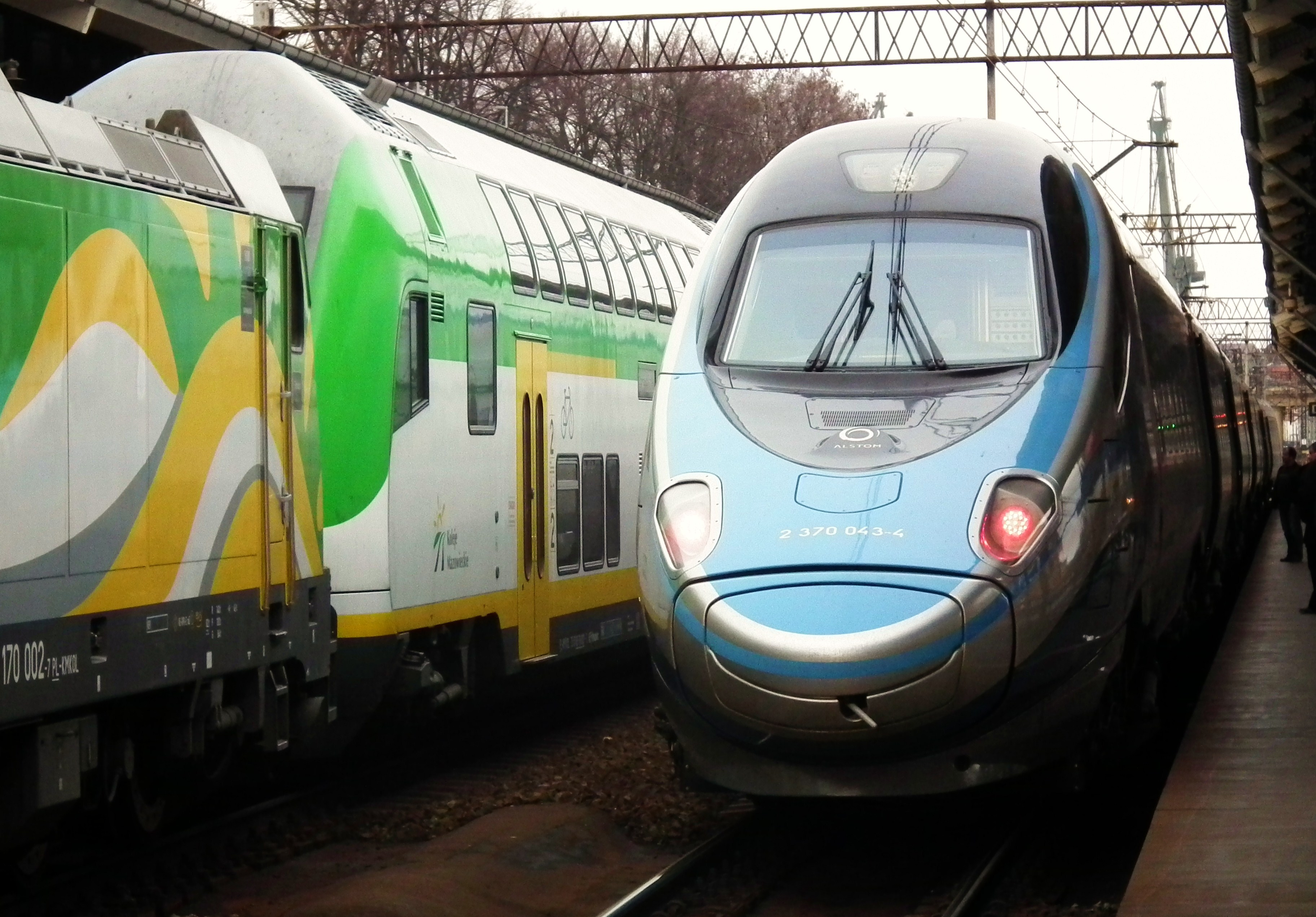 Gdańsk Gł. Pendolino i Słoneczny.